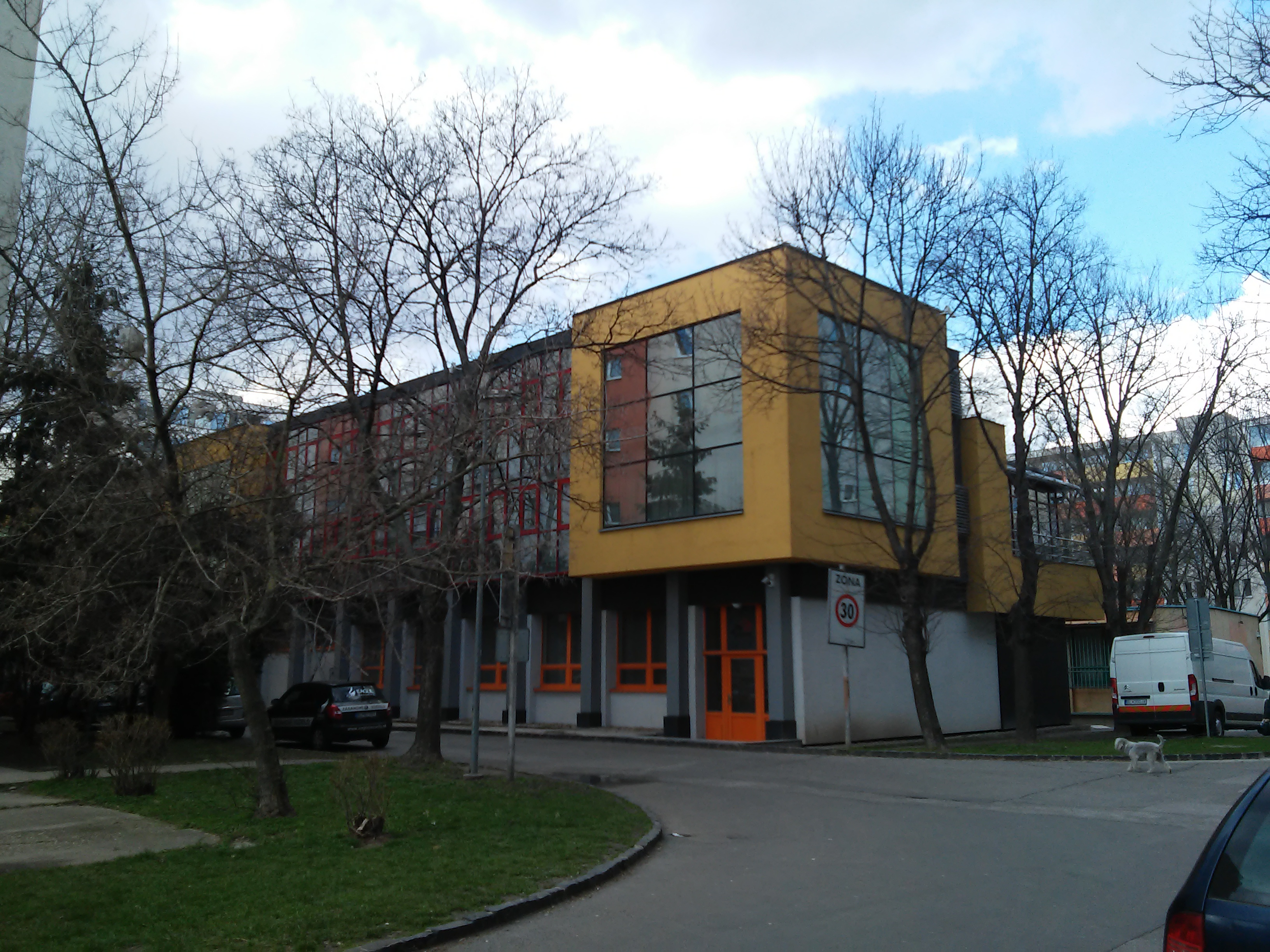 Súmračná 25, Ružinov, Bratislava